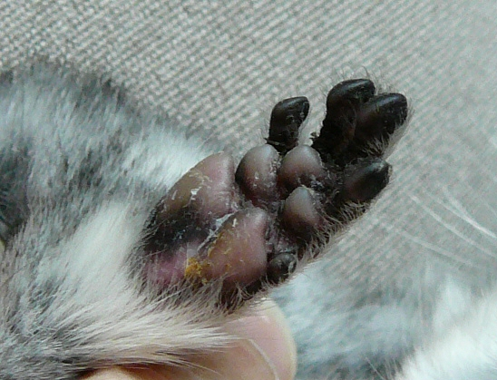 Chinchilla's paw, front leg / Patte avant de chinchilla - Chinchilla domestique gris adulte